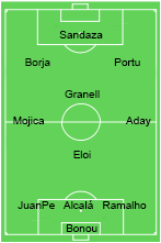 Alineación ascenso